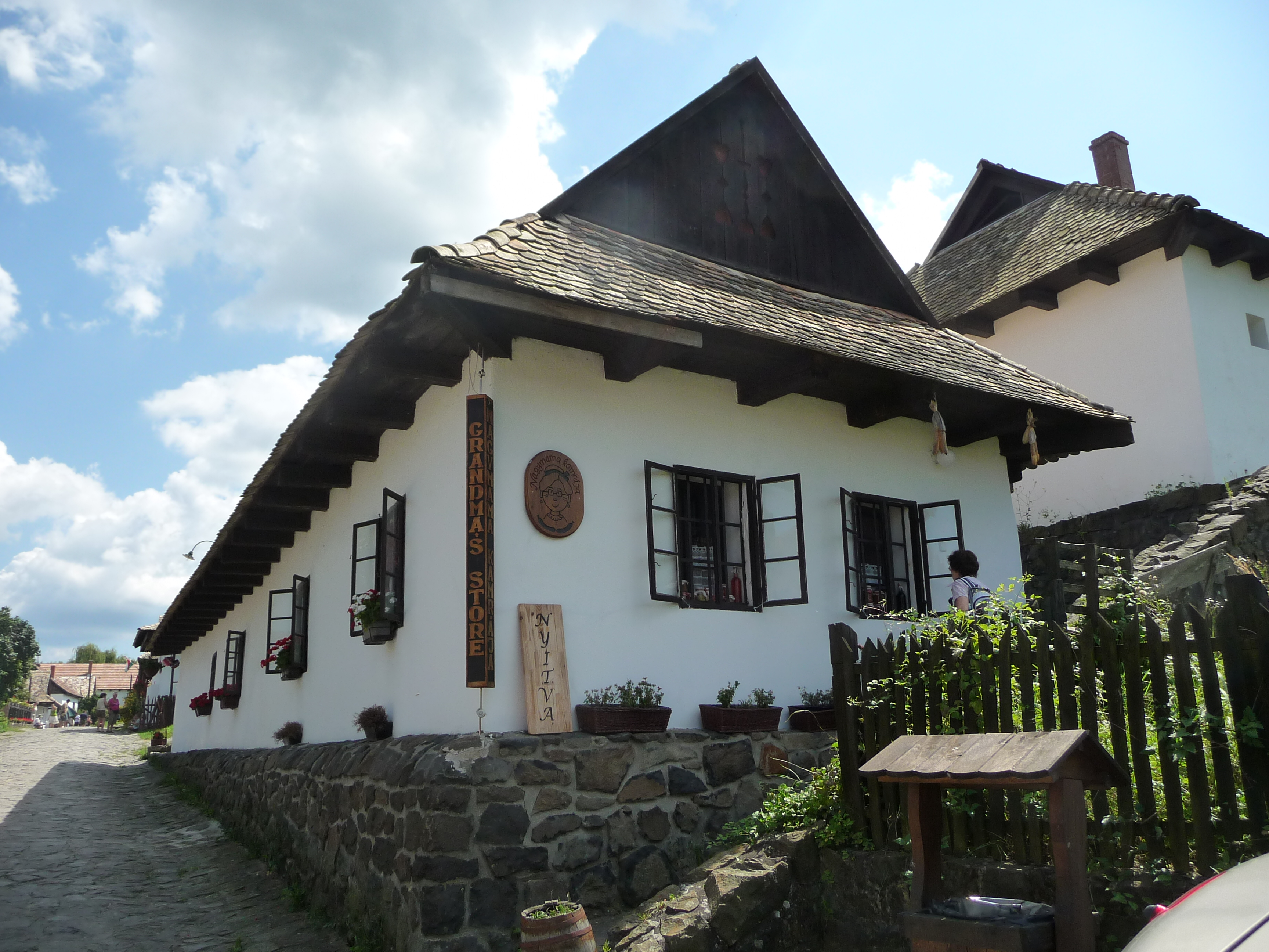 Hollókő, Kossuth út 84.